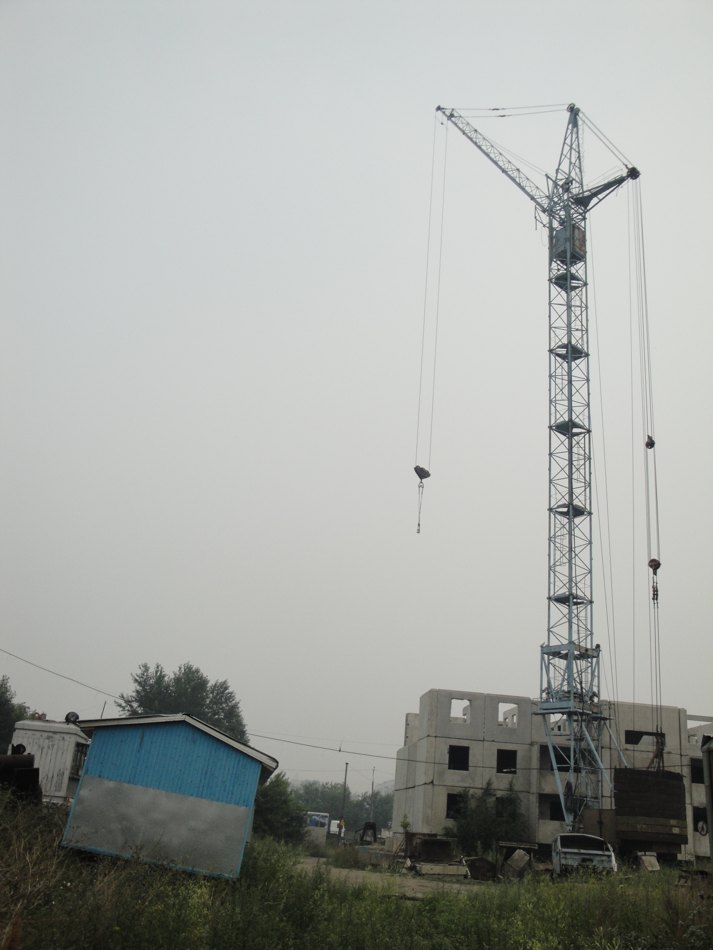 Башенный кран КБ-405 на строительстве жилого дома. Новосибирск, ул. Волховская 33в стр.